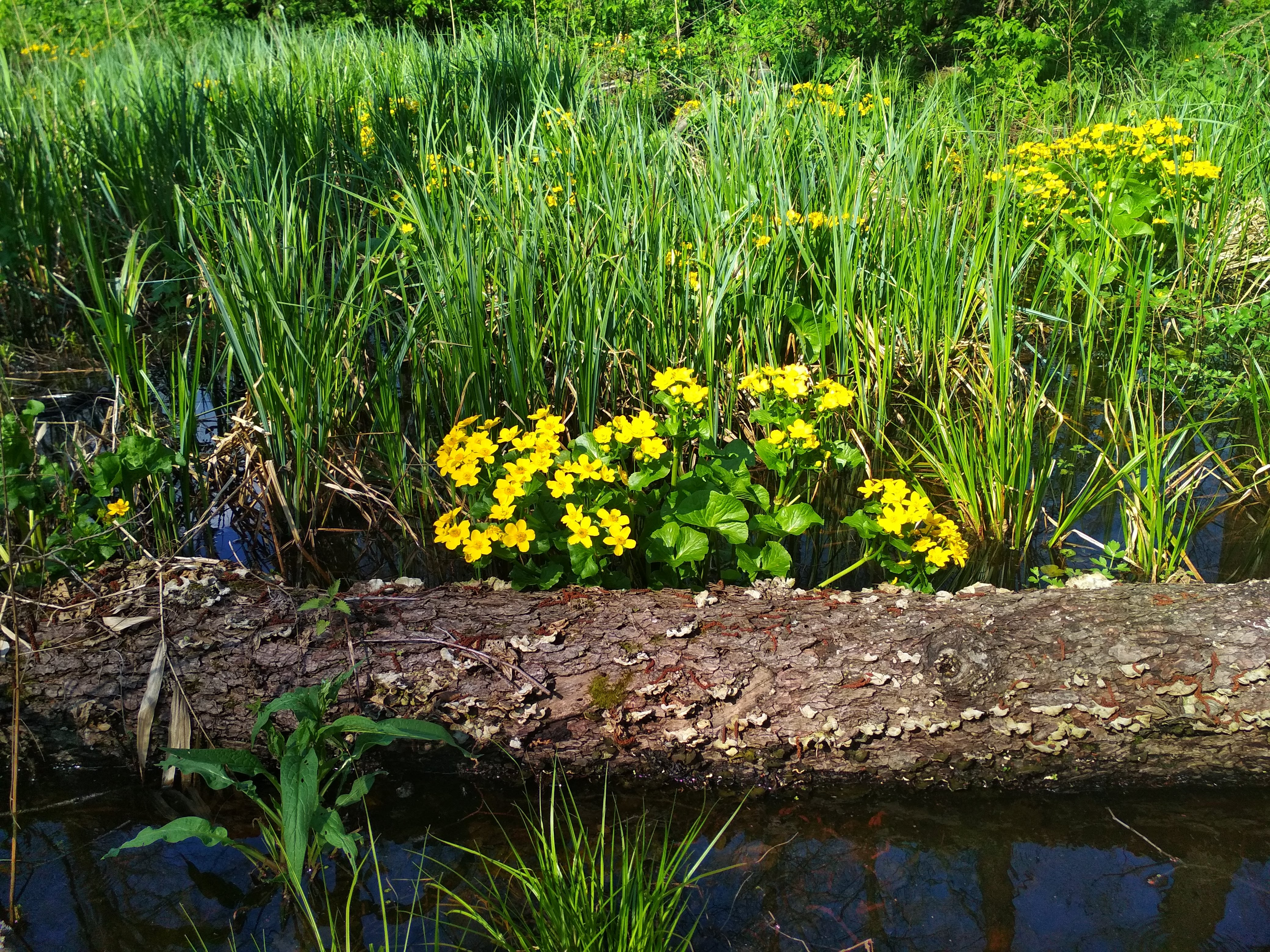 Воронежский заповедник: Территория заповедника расположена на границе Воронежской (Верхнехавский р-н) и Липецкой (Усманский р-н) областей и занимает северную половину островного лесного массива – Усманского бора., Верхнехавский район, Воронежская область This image is related to the protected area of Russia number 3600069